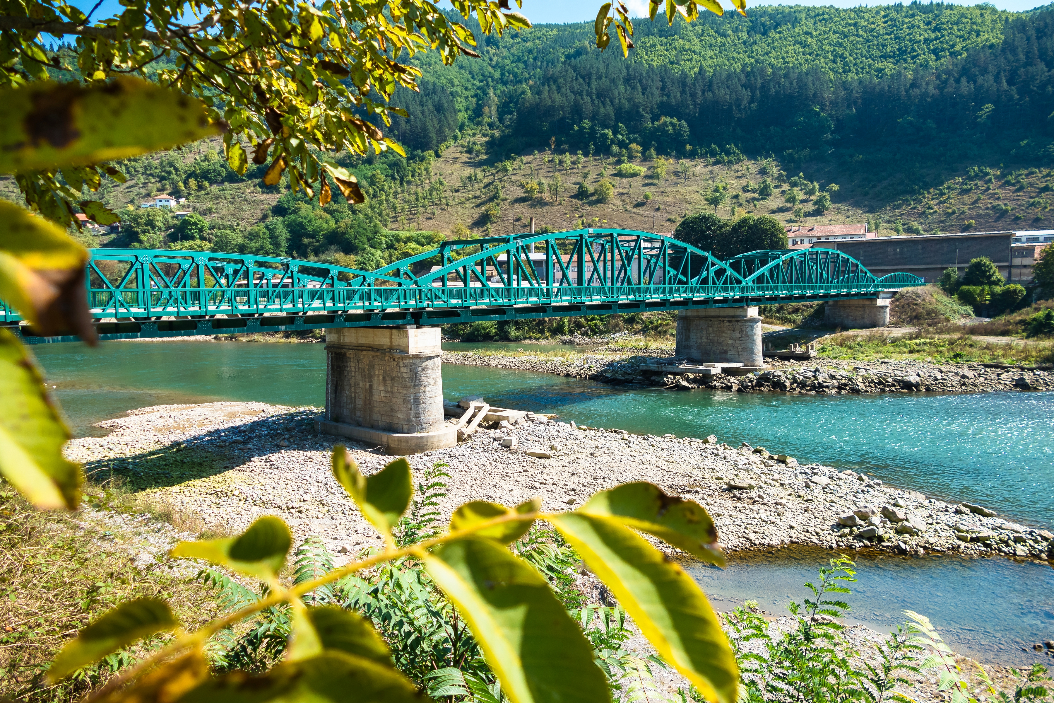 Željezni most princa Karla premošćuje rijeku Drinu. Austro-Ugarska je najprije izgradila drveni most. Današnji željezni most počeo se graditi u junu 1882., a dovršen je i pušten u saobraćaj 22. oktobra 1884. godine. Most je dobio obnovljen i dobio je novi izgled 2018 godine